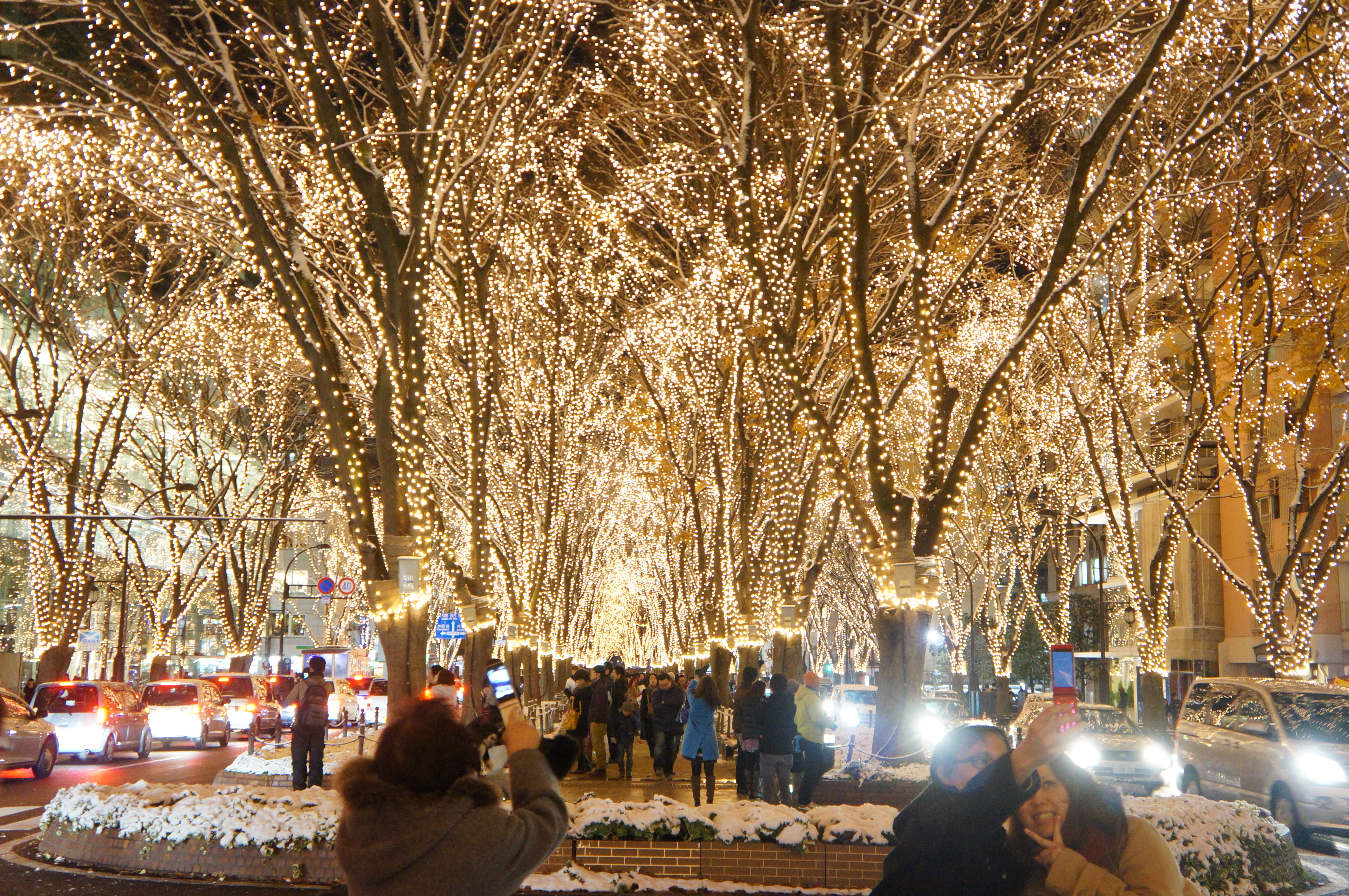 2012年の様子。